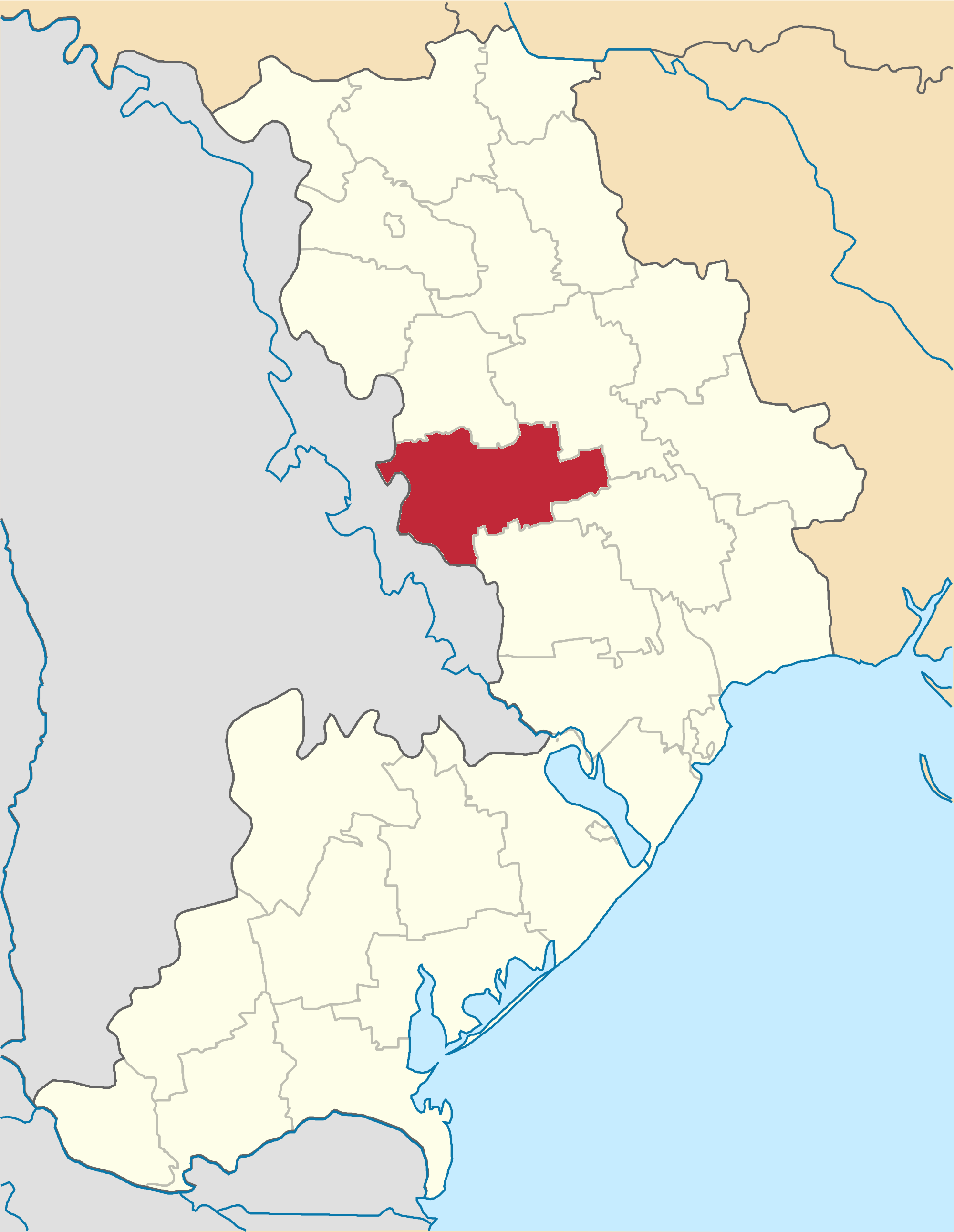 Velykomyhaylivskyi-Raion map